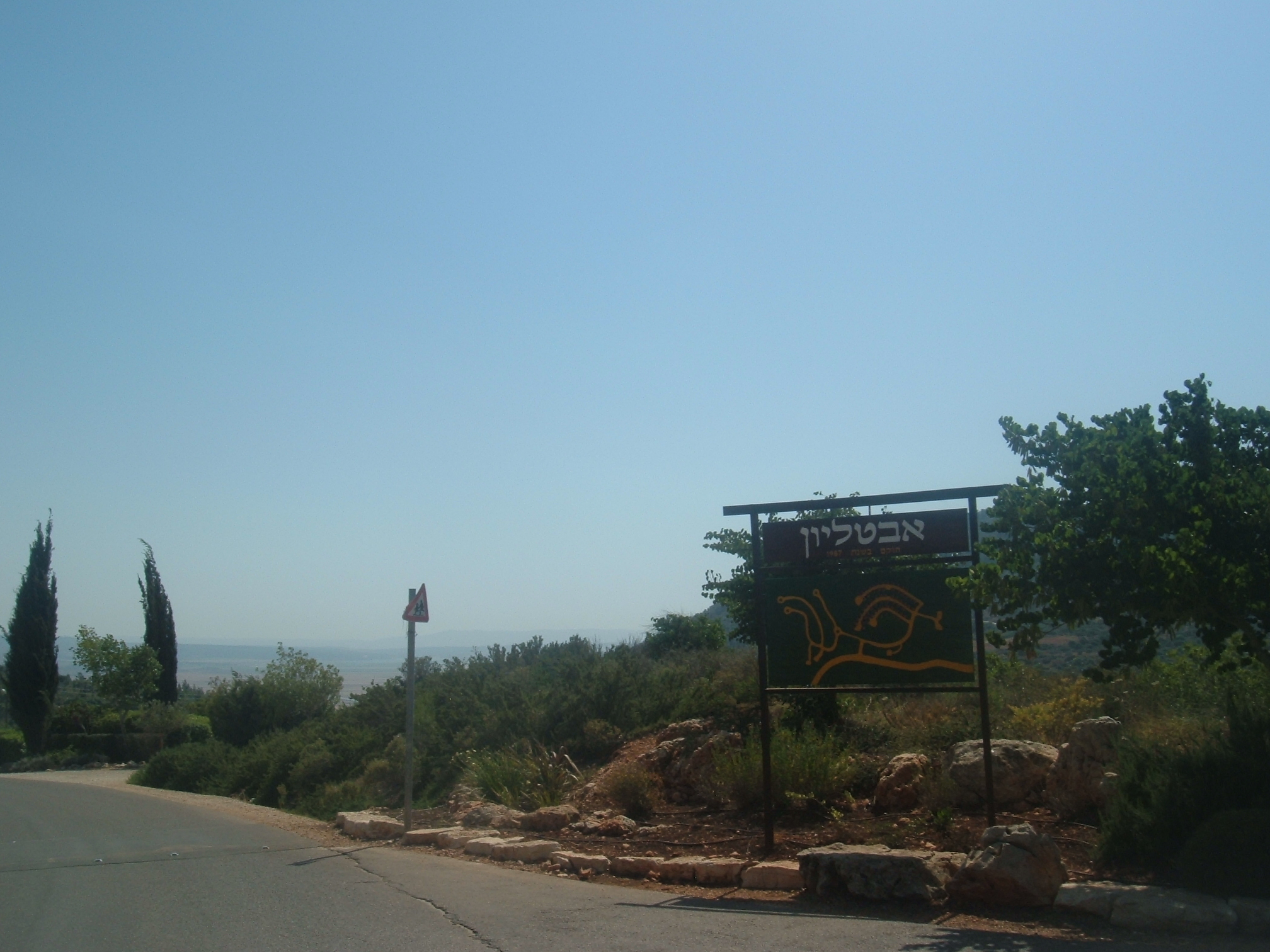 avtalyon הכניסה לאבטליון